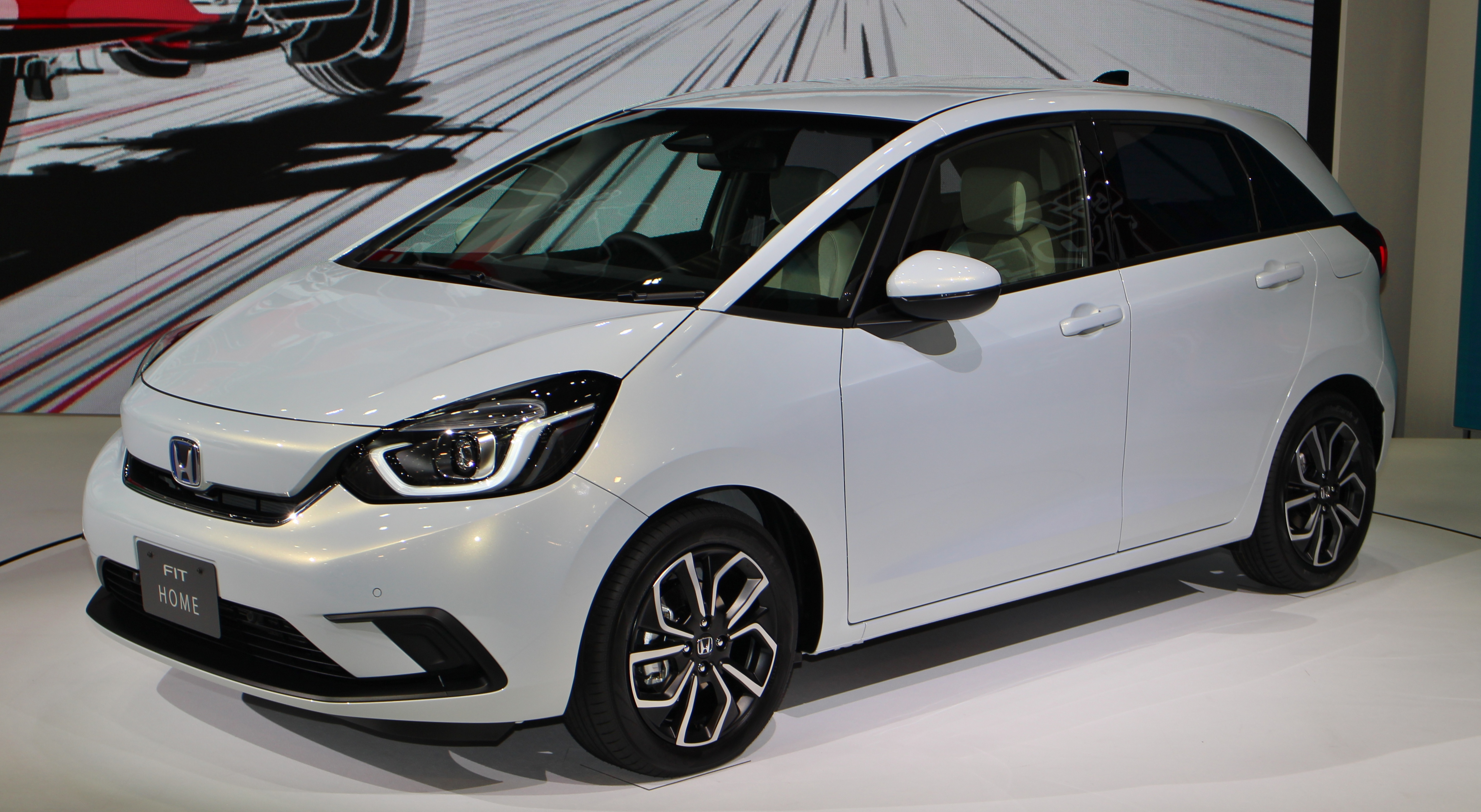 Honda Fit